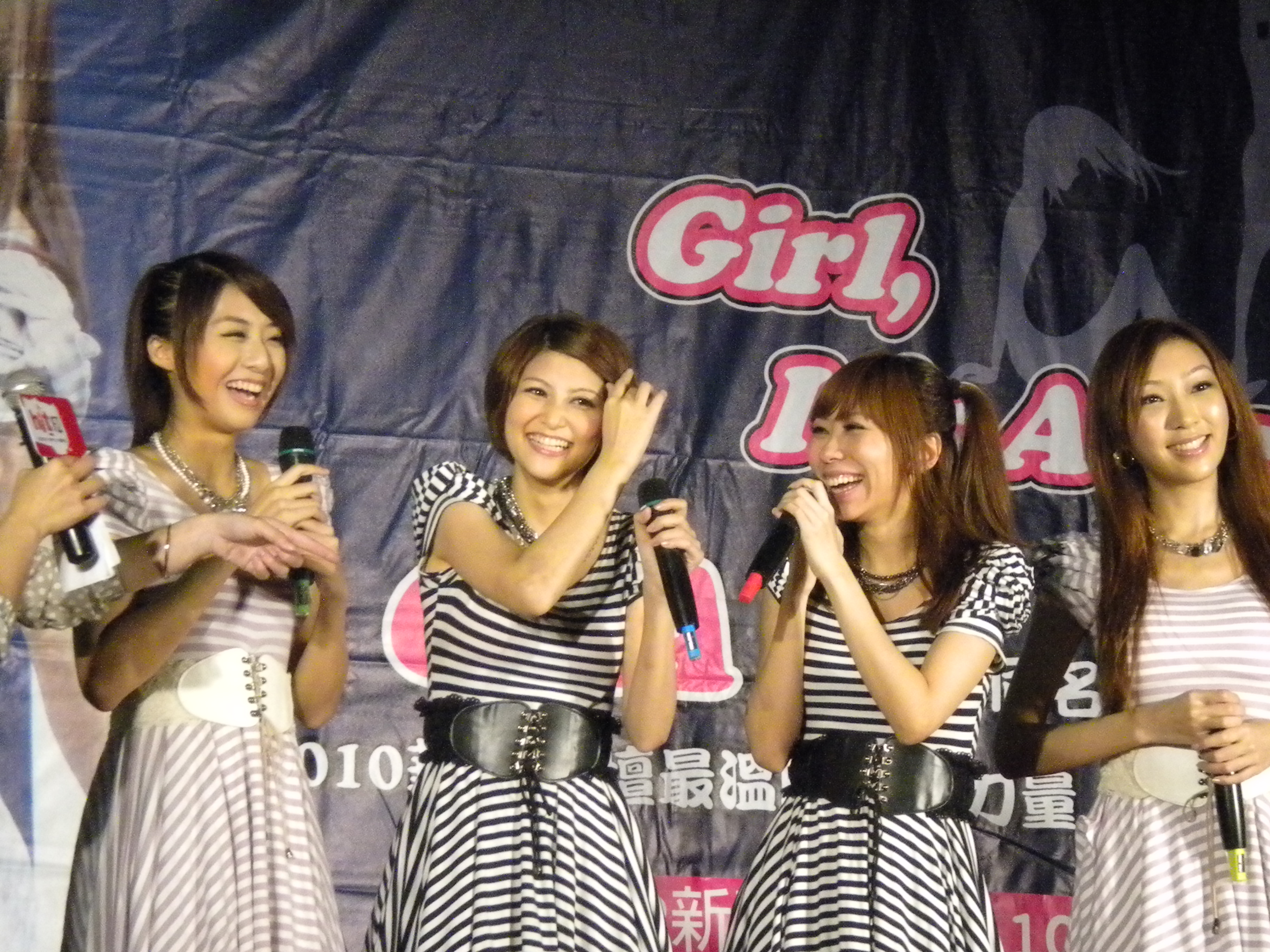 GIA《首張同名專輯》台中簽唱會